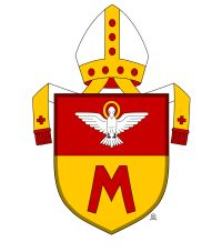 Nový znak královehradecké dieceze (od 1.1.2014)